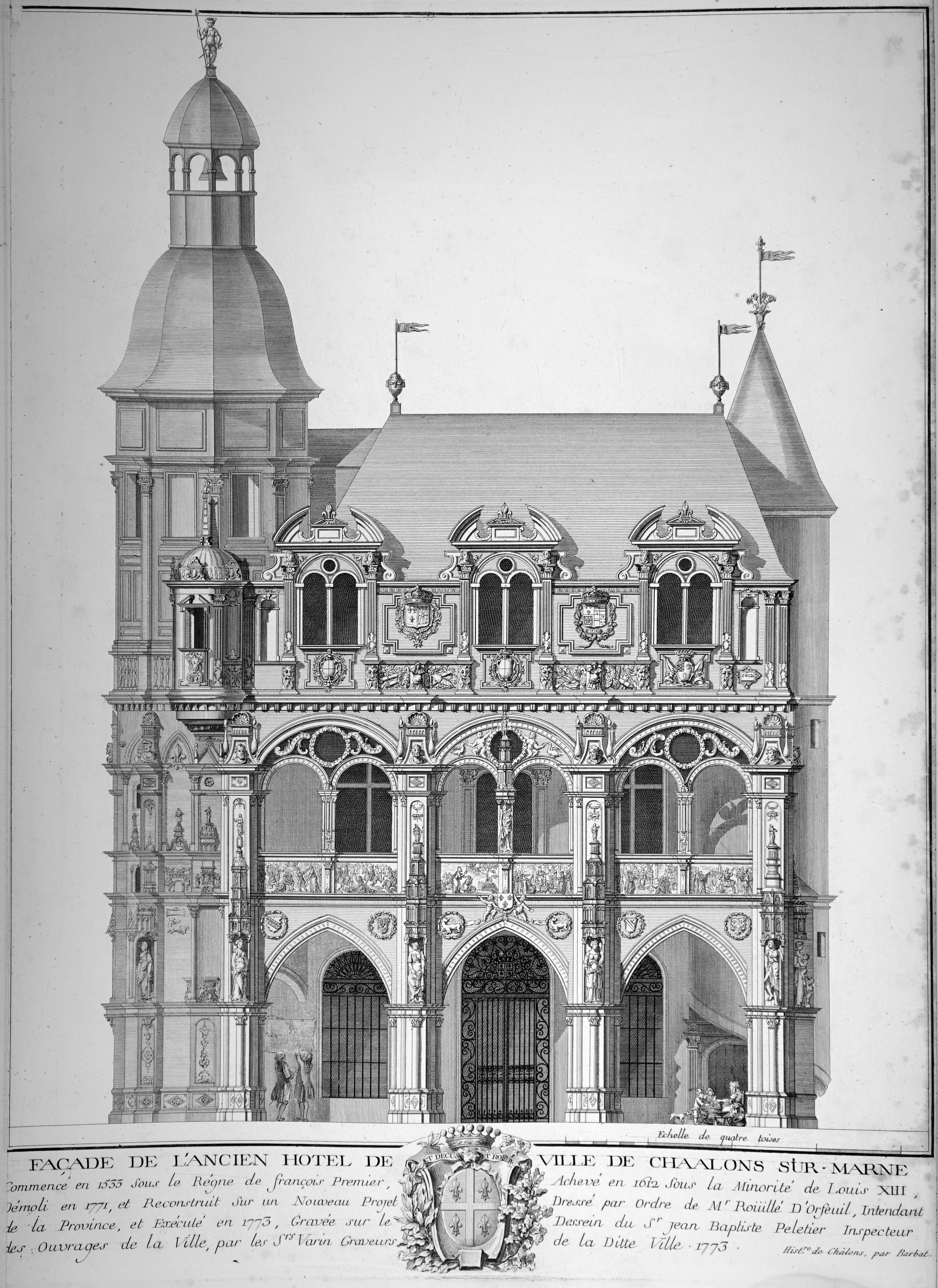 Vue de l'ancienne mairie aujourd'hui détruite.